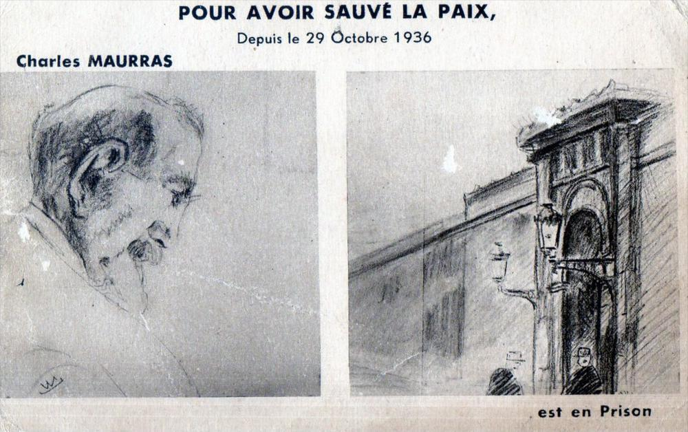 Carte postale éditée par la "Propagande nationale" en soutien à Charles Maurras incarcéré à la prison de la Santé.